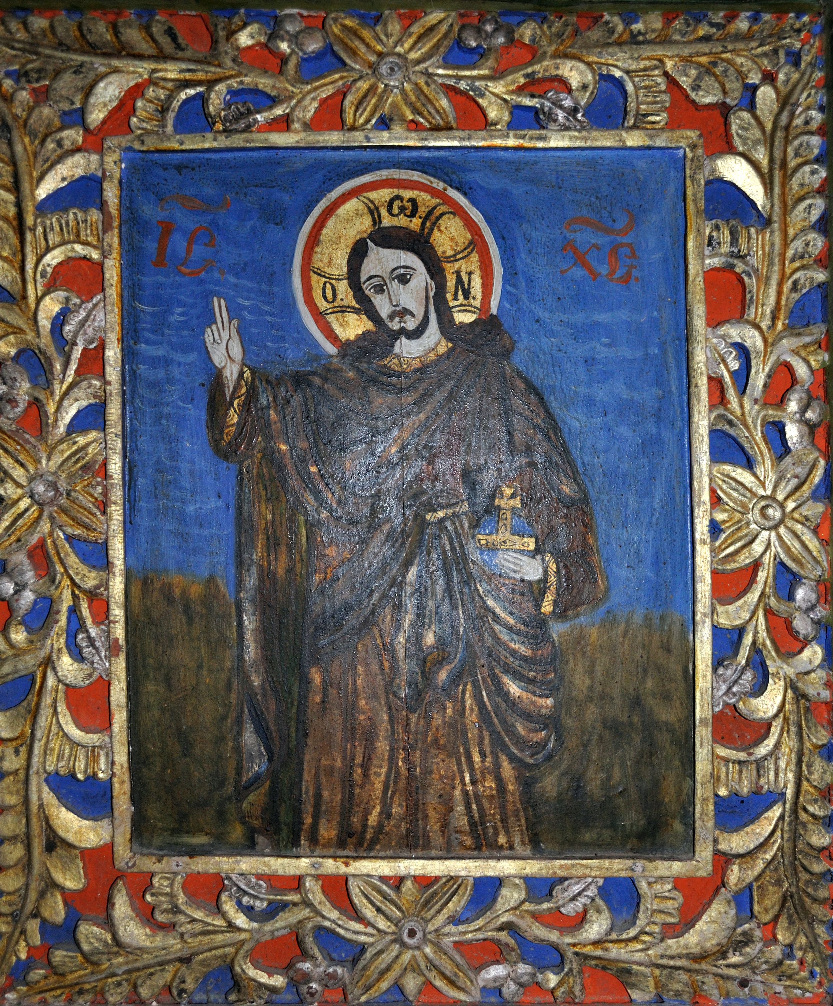 Biserica de lemn „Sfinții împărați Constantin și Elena” din Bârlești, județul Alba